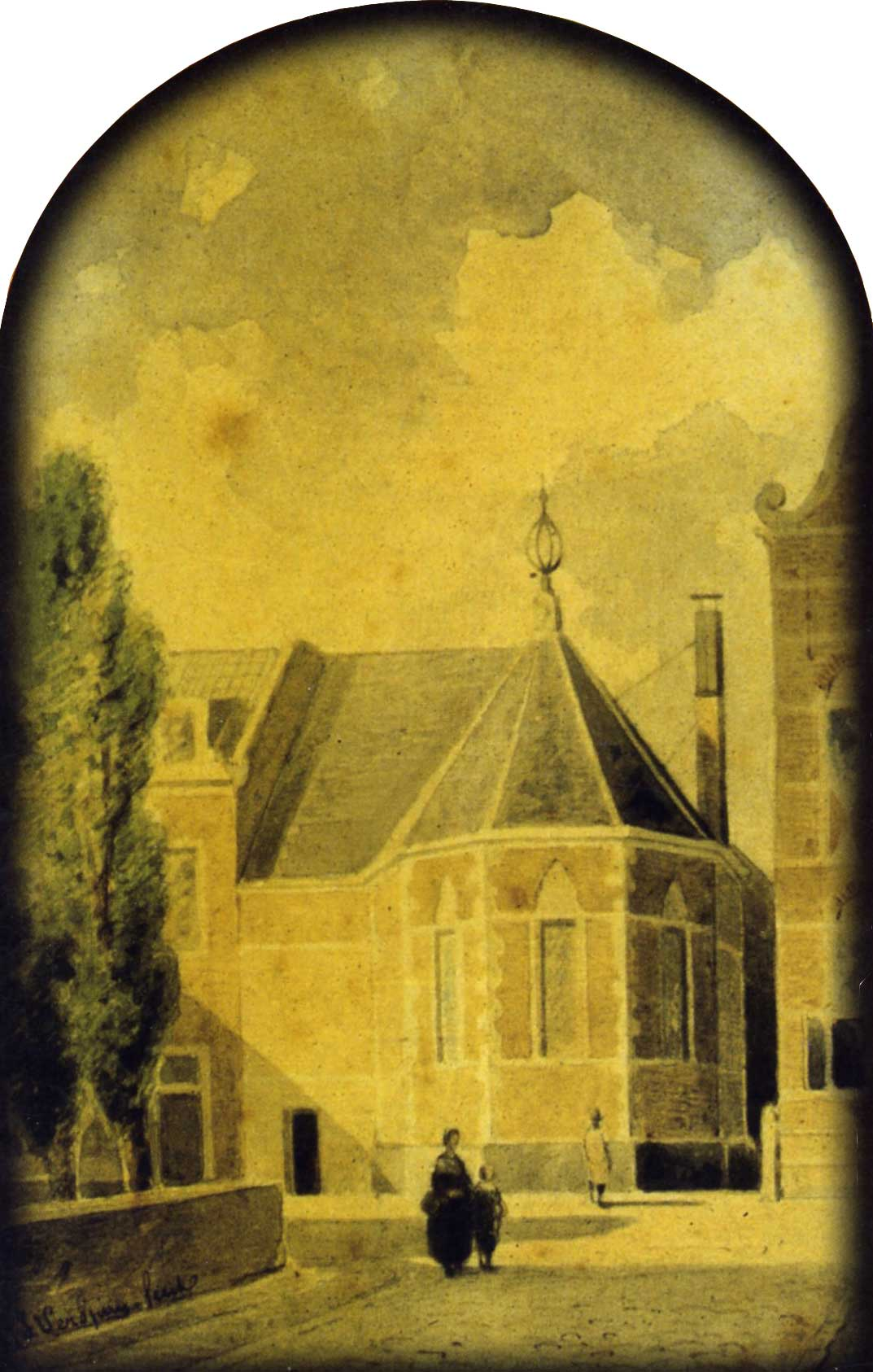 Jeruzalemkapel in Gouda - lithografie